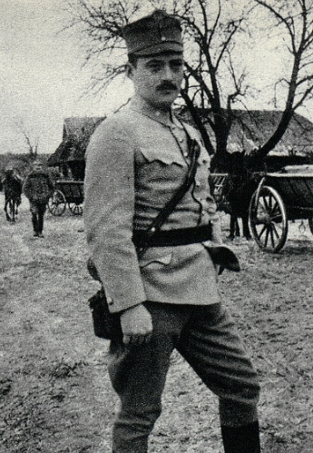 Ppor. Stefan Iwanowski, żołnierz Legionów Polskich (Żandarmieria). Ur. 1890, zm. 1954. Odznaczony VM 5.klasy, KN, Polonią Restituta 4.klasy, KW francuską Legią Honorową 5.klasy i innymi odznaczeniami. Więcej: [1]